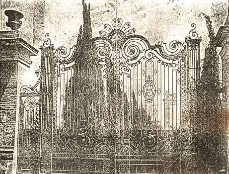 Portón de la quinta de Bernardo Ader, circa 1930. Detrás, a la derecha, se ve la silueta de la Torre. Villa Adelina, Buenos Aires, Argentina.